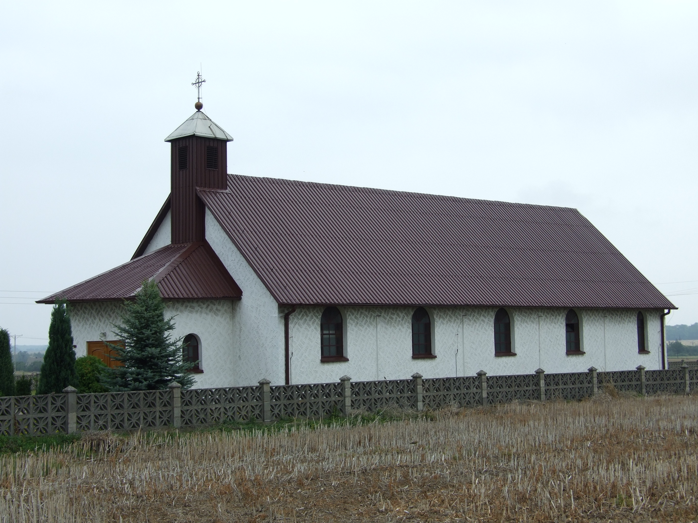 Kościół w Glinicy (województwo śląskie)